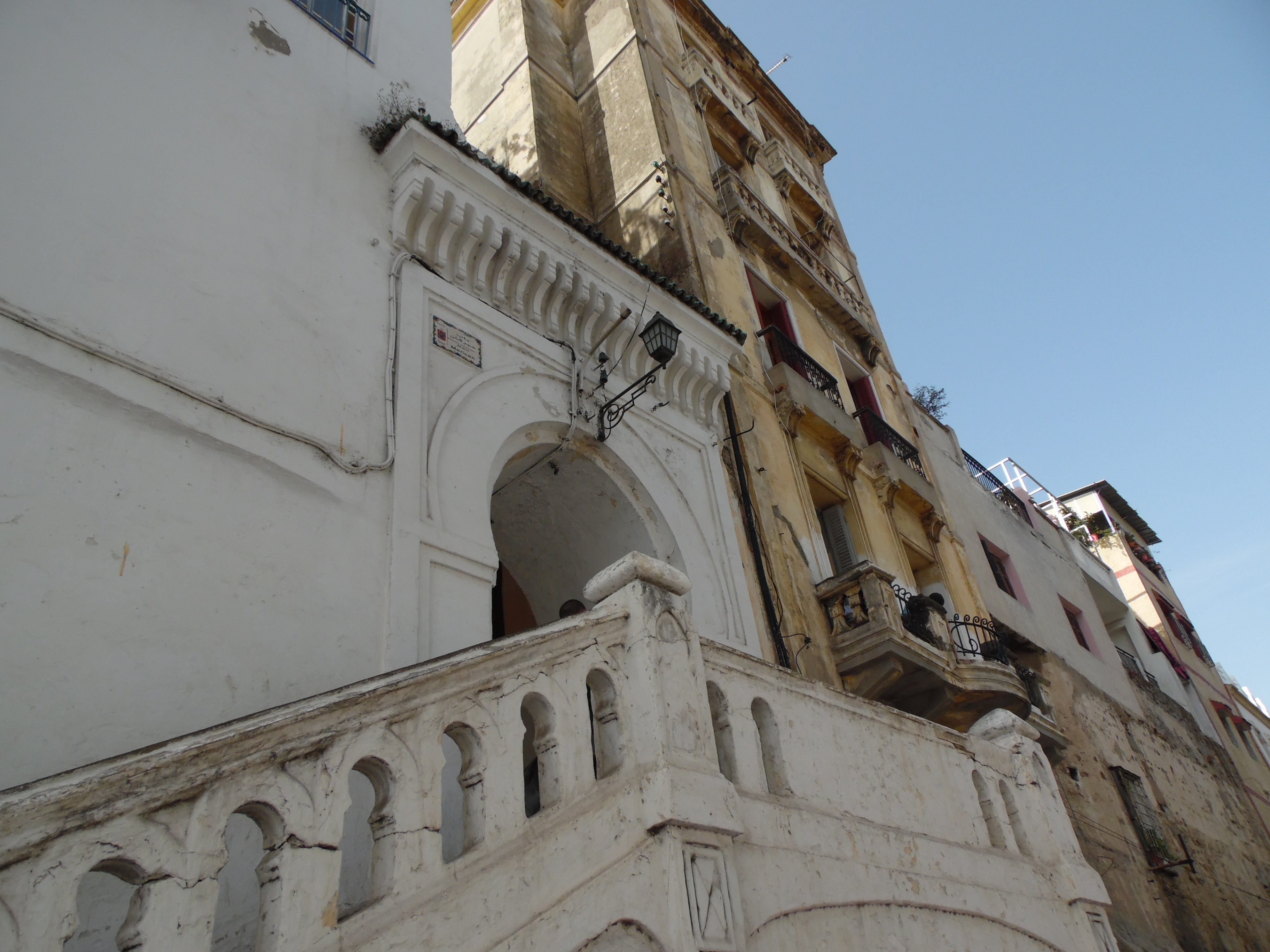 Medina de Tánger